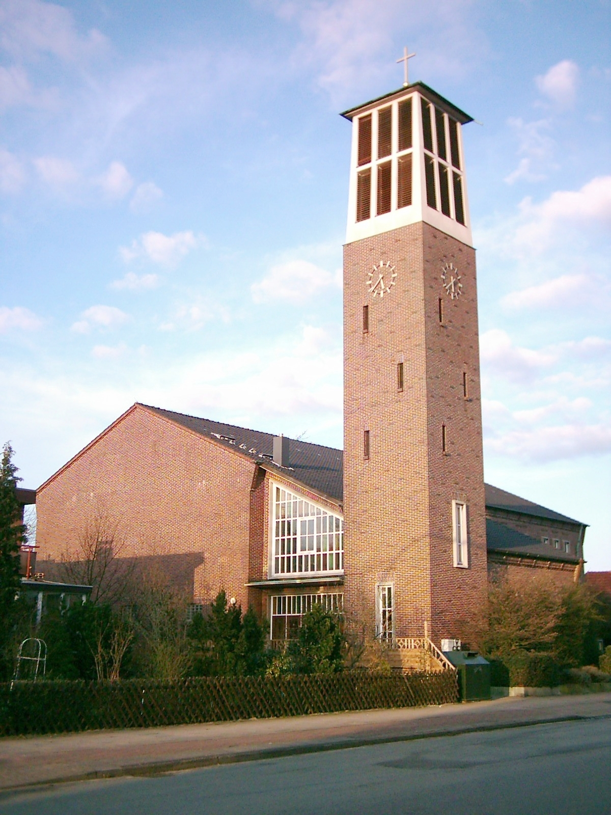 Die Thomaskirche in Hamburg-Hausbruch, Lange Striepen.